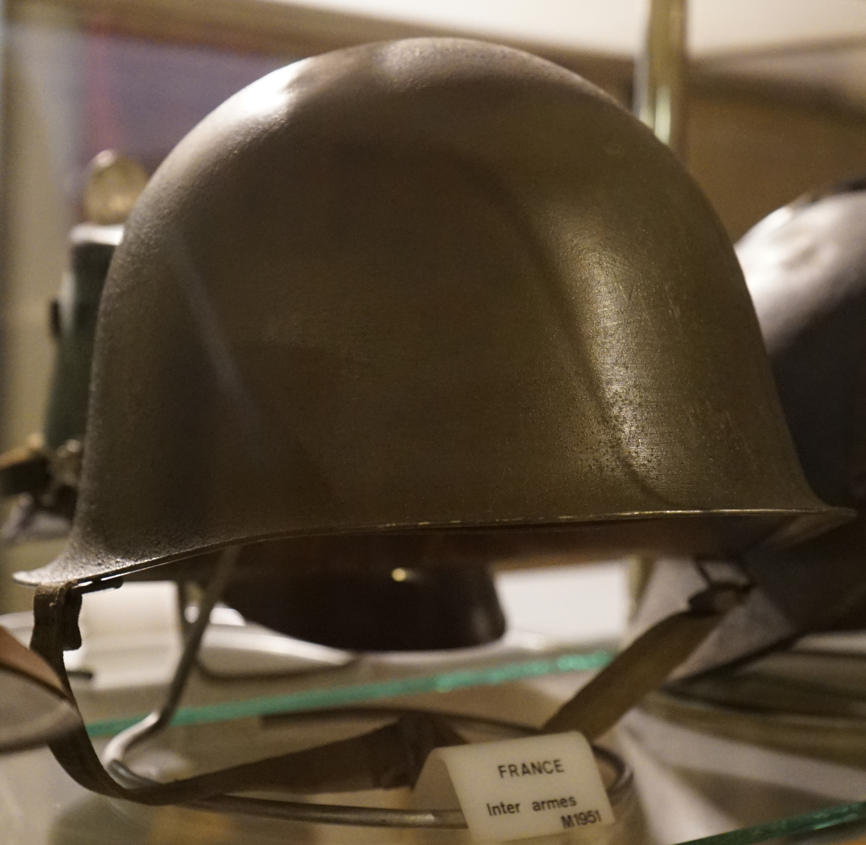 présenté au musée de Toul.